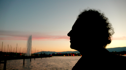 autorretrato a contraluz